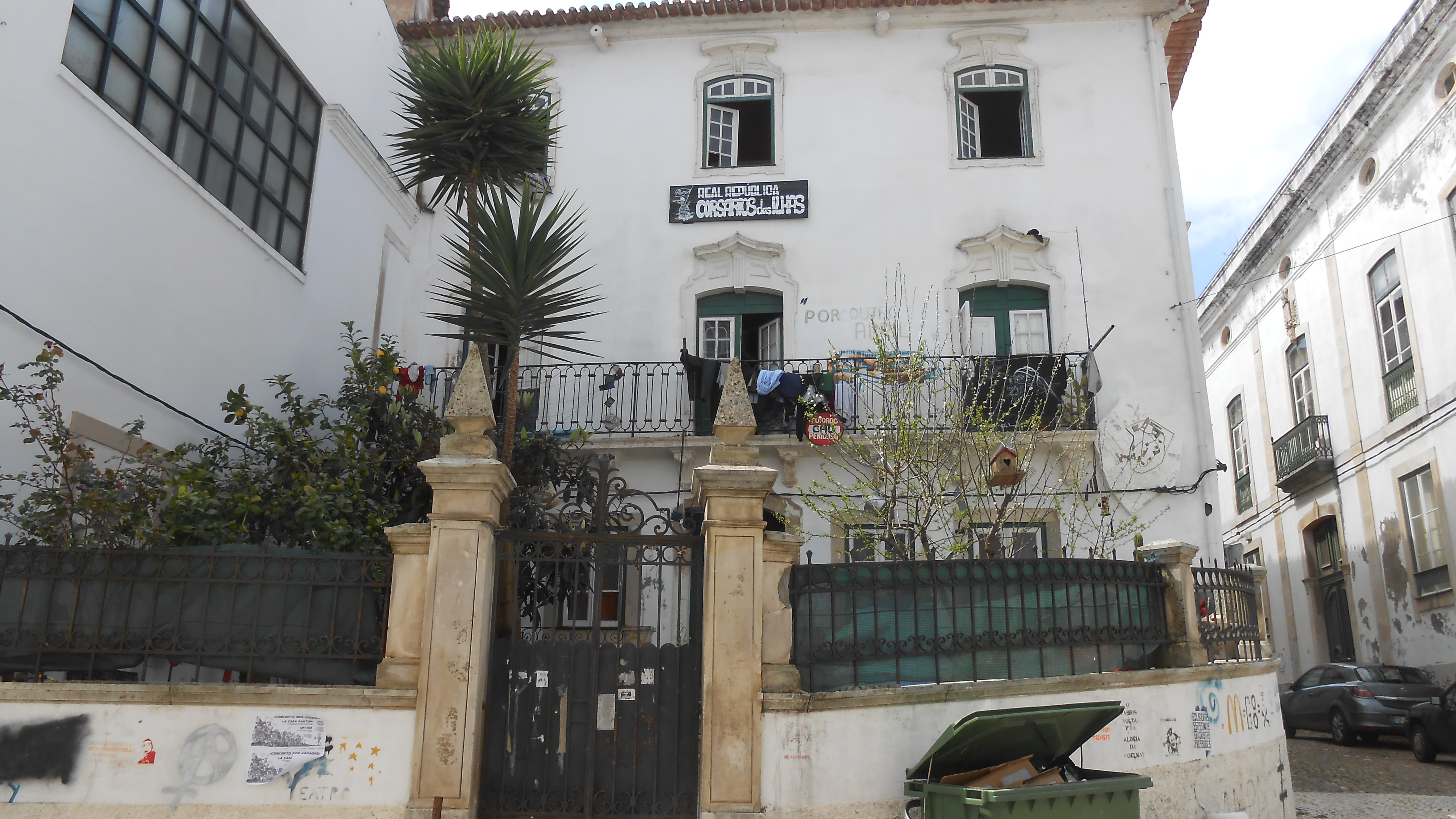 Die Real República Corsários das Ilhas, eine der traditionellen Studentenwohngemeinschaften Coimbras